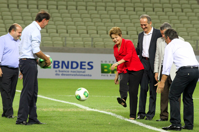 A presidenta Dilma Rousseff deu o pontapé inicial do Estádio Castelão